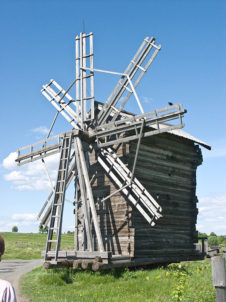 Россия: Карелия: Кижи: ветряная мельница из д.Вороний Остров; 14:09 14.06.2008